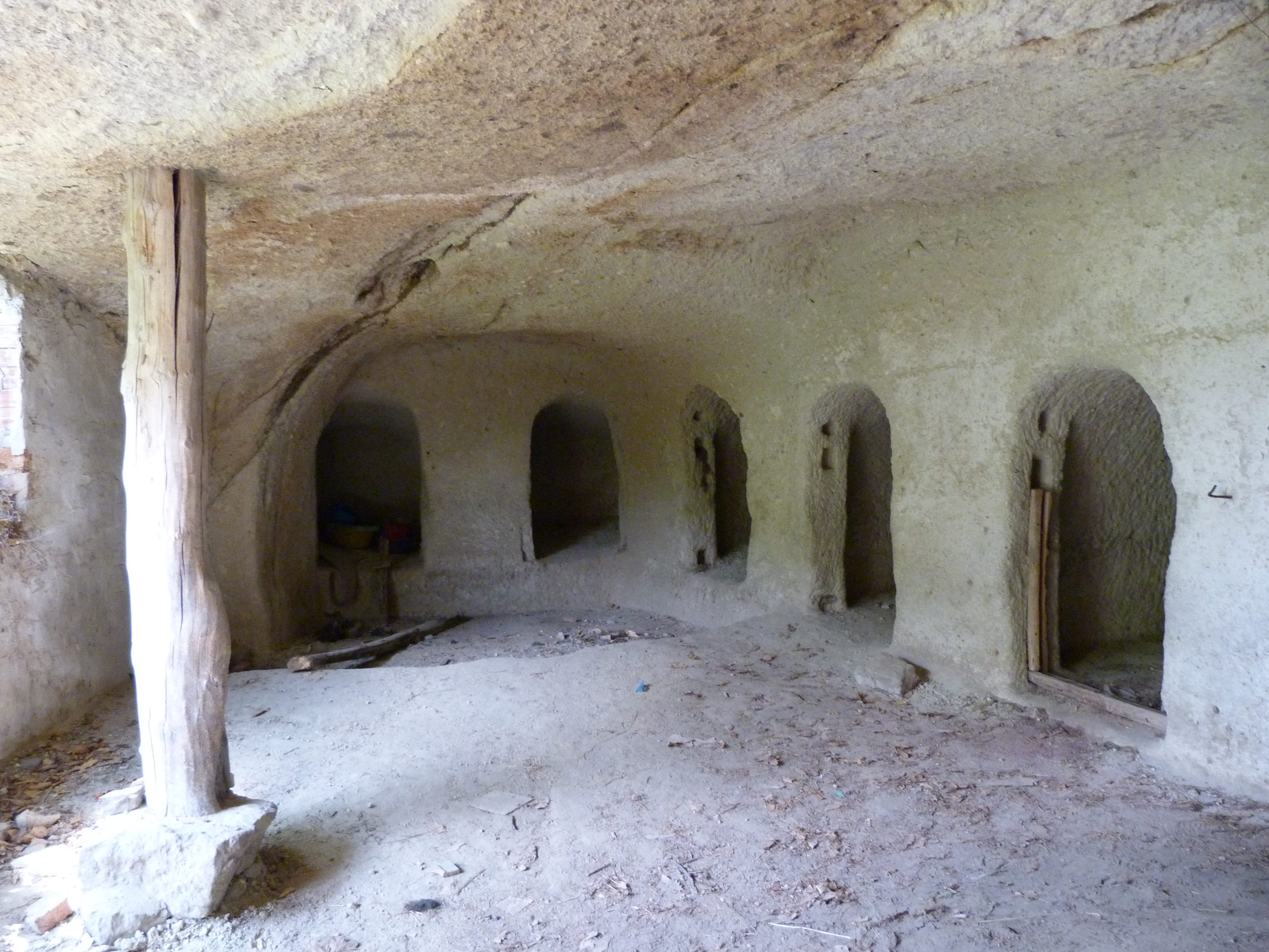 A felvétel 2014. június 20-án, pénteken készült. Cserépváralja, Borsod Abaúj Zemplén Megye. Tardról Cserépváralja felé közeledve, közvetlenül Cserépváralja előtt a Szent István Mezőgazdasági Szövetkezet Ifjúsági táborát jelző táblánál le kell térni. Még az Ifjusági tábor előtt kell jobbra letérni. A Cserépvár előtti útszakaszon jobb oldalt található a barlaglakás.